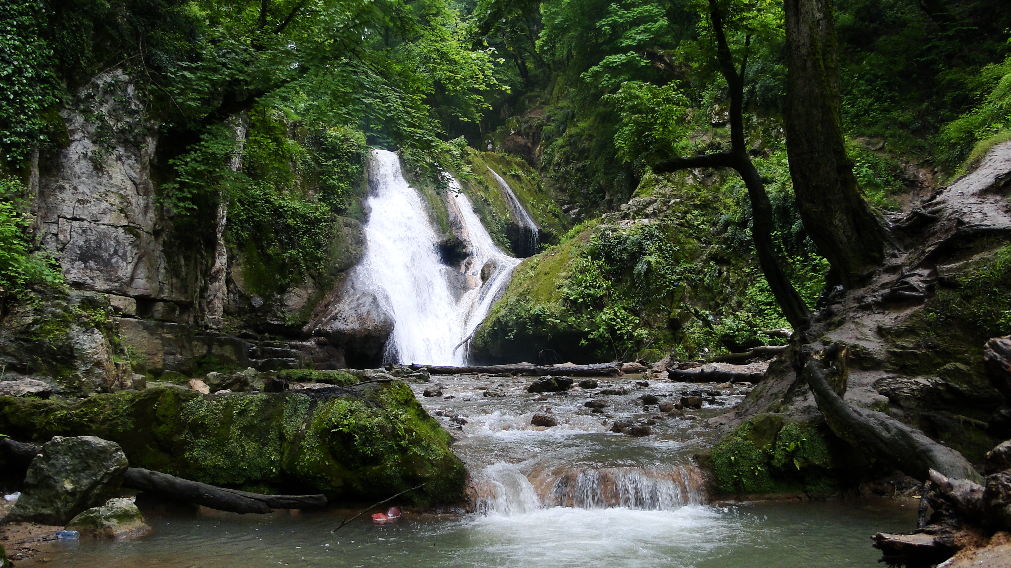 نمای یکی از چندین آبشار لوه